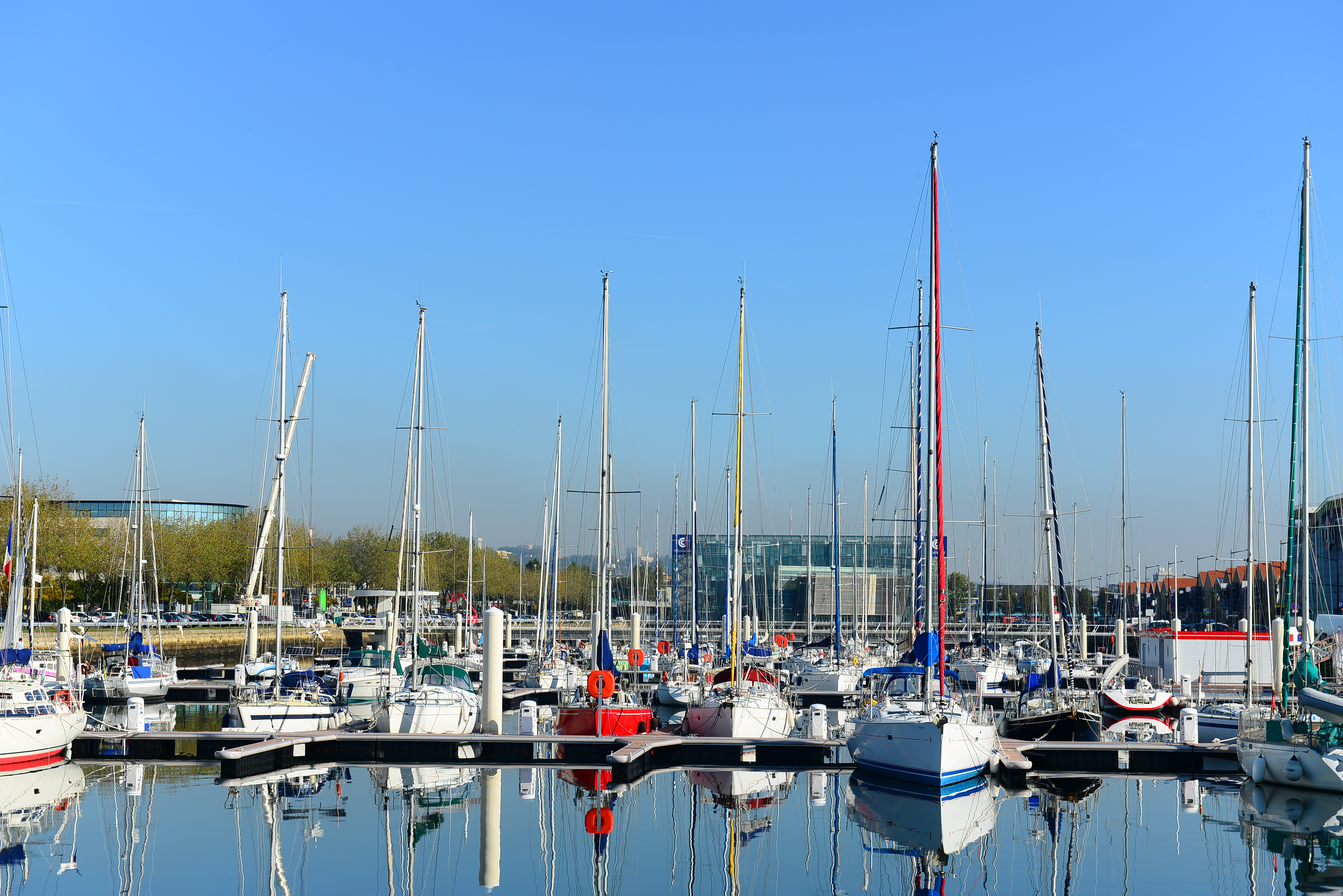 Le Port Vauban